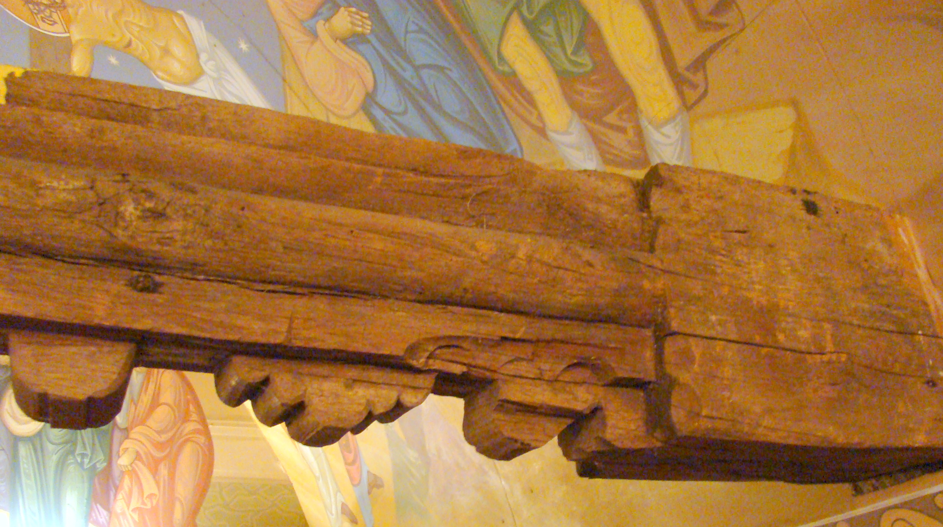 Biserica de lemn „Sf. Teodor Tiron" din Brătești, județul Bihor